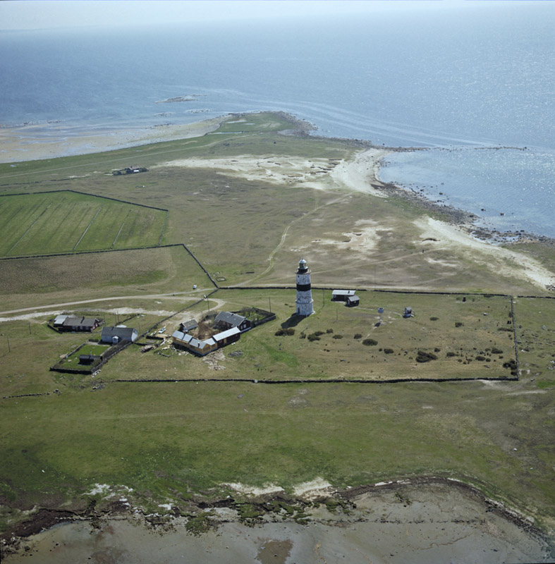 Glommens fyr från 1843 i bildens mitt. Från nordväst. Ingår i Morups tånge naturreservat. Motiv: Morups tånge Nyckelord: Flygbilder, Naturreservat Kategori: Kust- och skärgårdsmiljö, Fyrplats Glommens fyr från 1843 i bildens mitt. Från nordväst. Ingår i Morups tånge naturreservat.